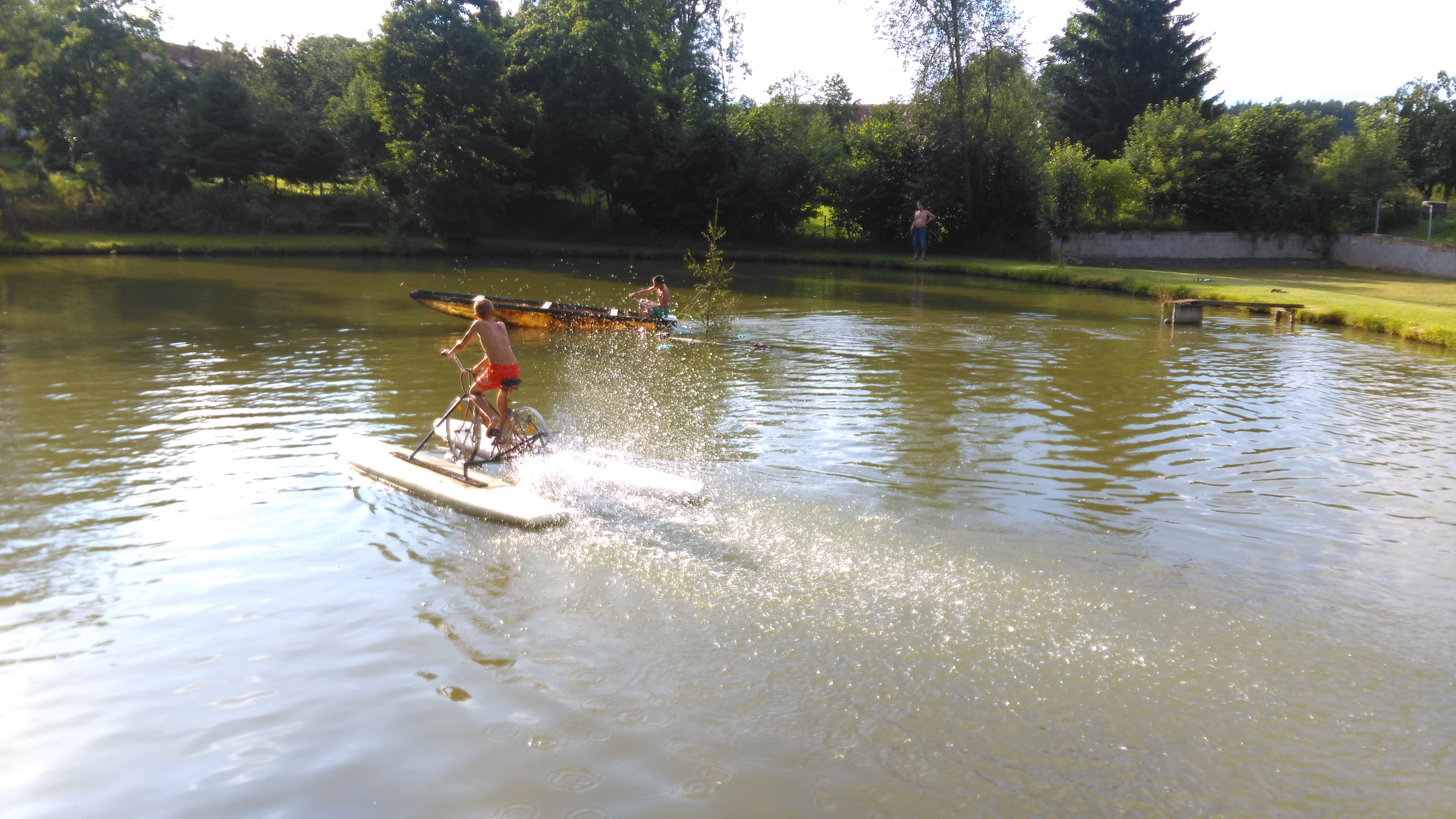 Vodní kolo LJP